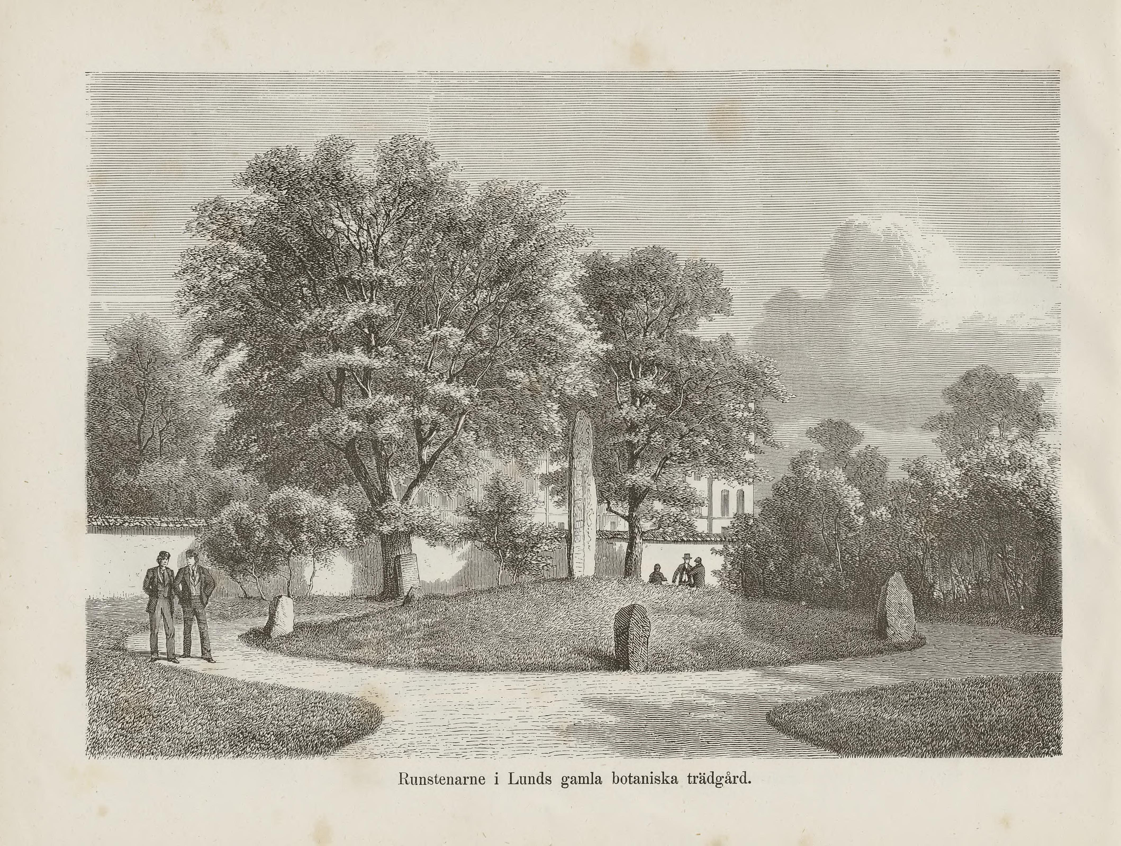 Illustrasjon hentet fra boken Nordiska taflor av ukjent forfatter og utgitt av Albert Bonnier (se, 1873)